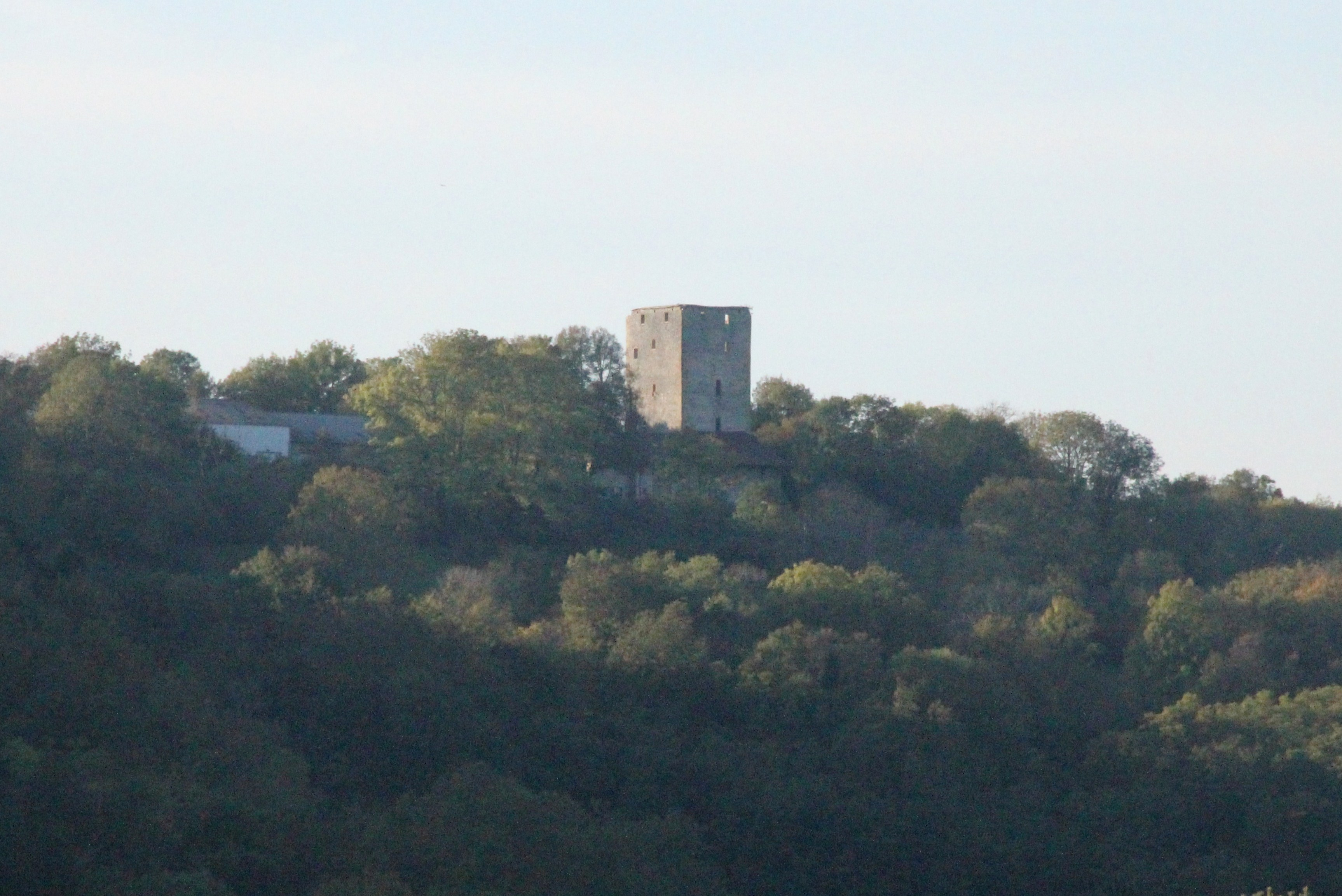 Vue du village